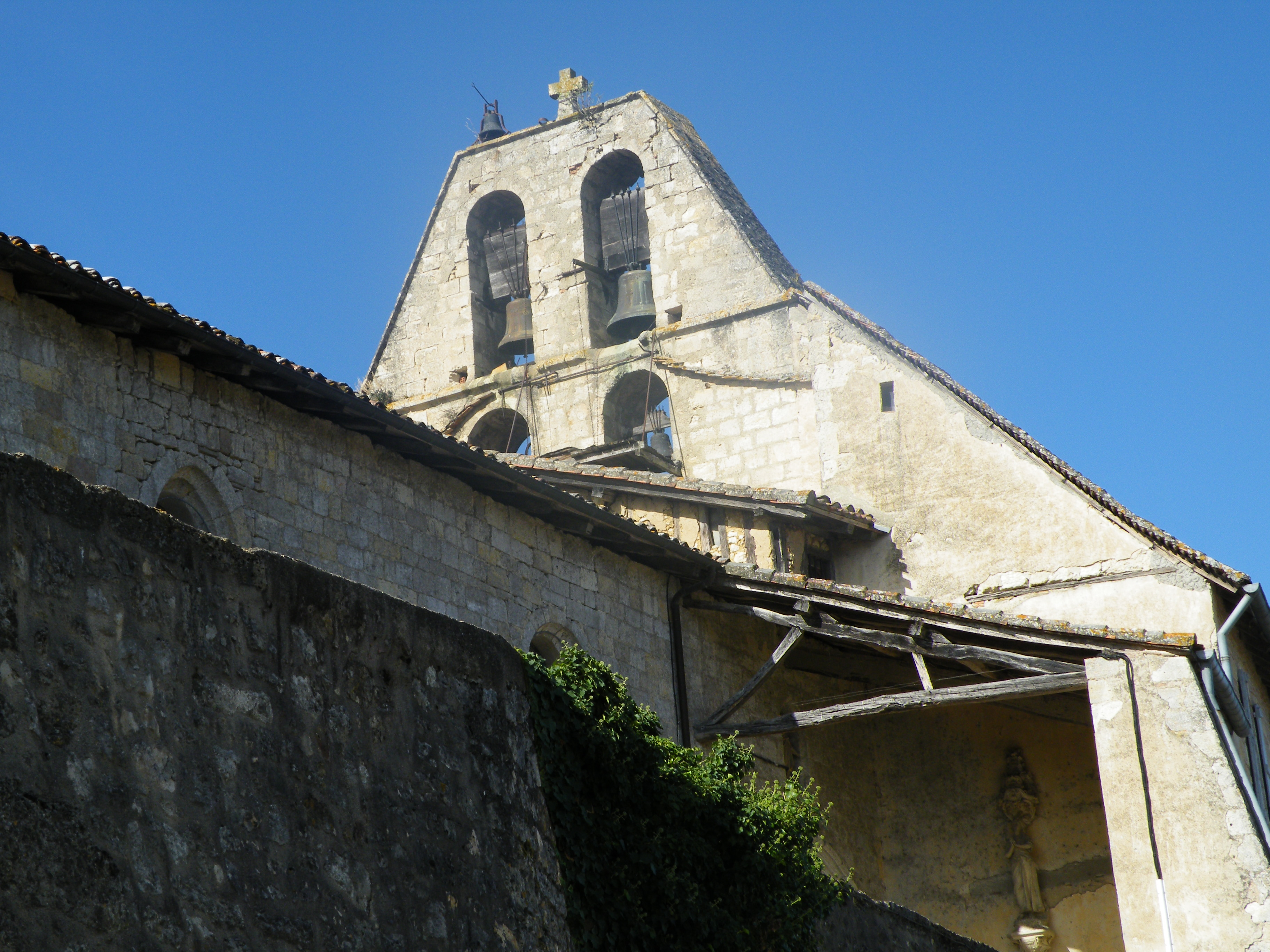 Église de Lachapelle (Tarn-et-Garonne) .